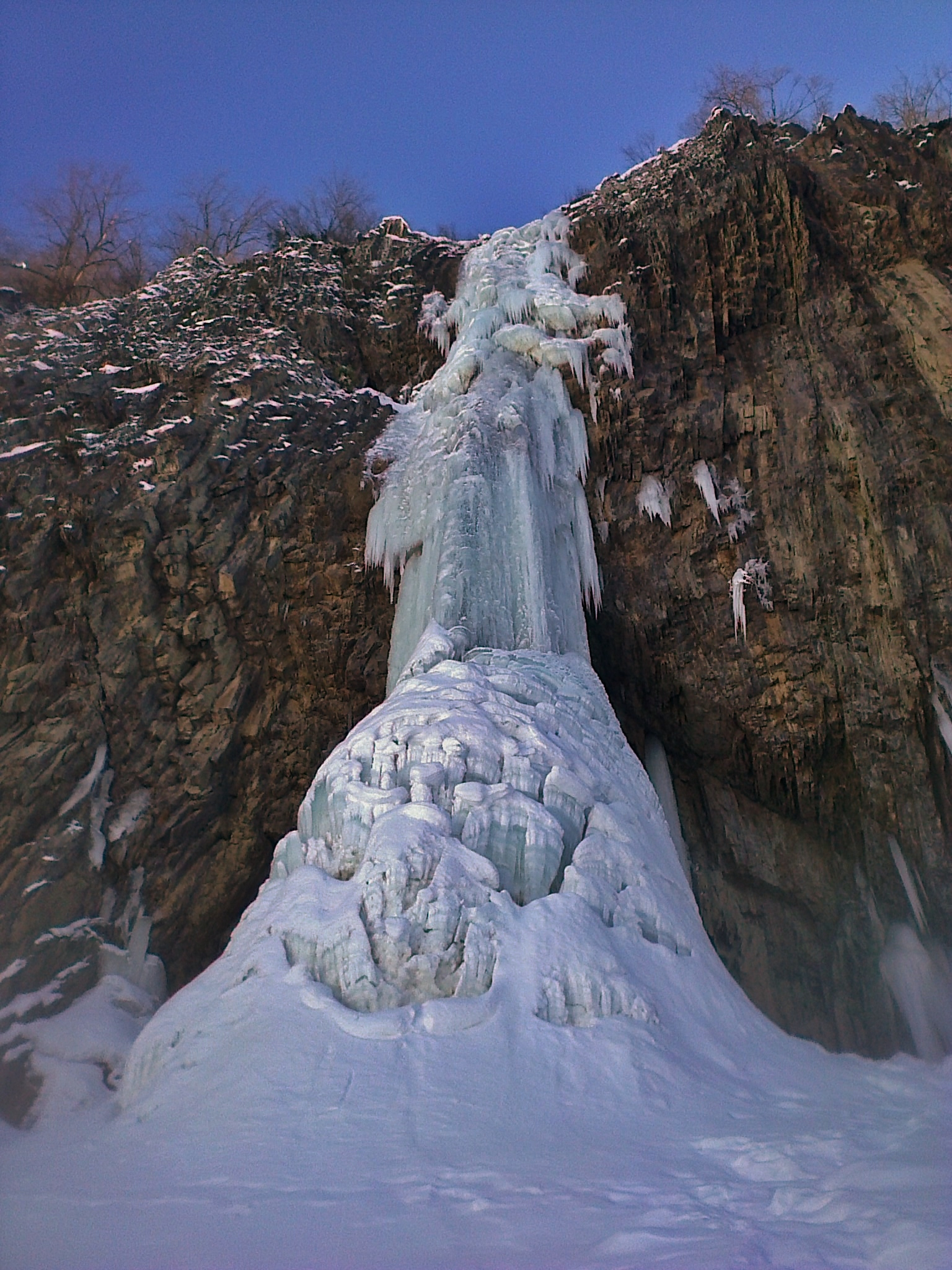 Ramramay şəlaləsi qışda